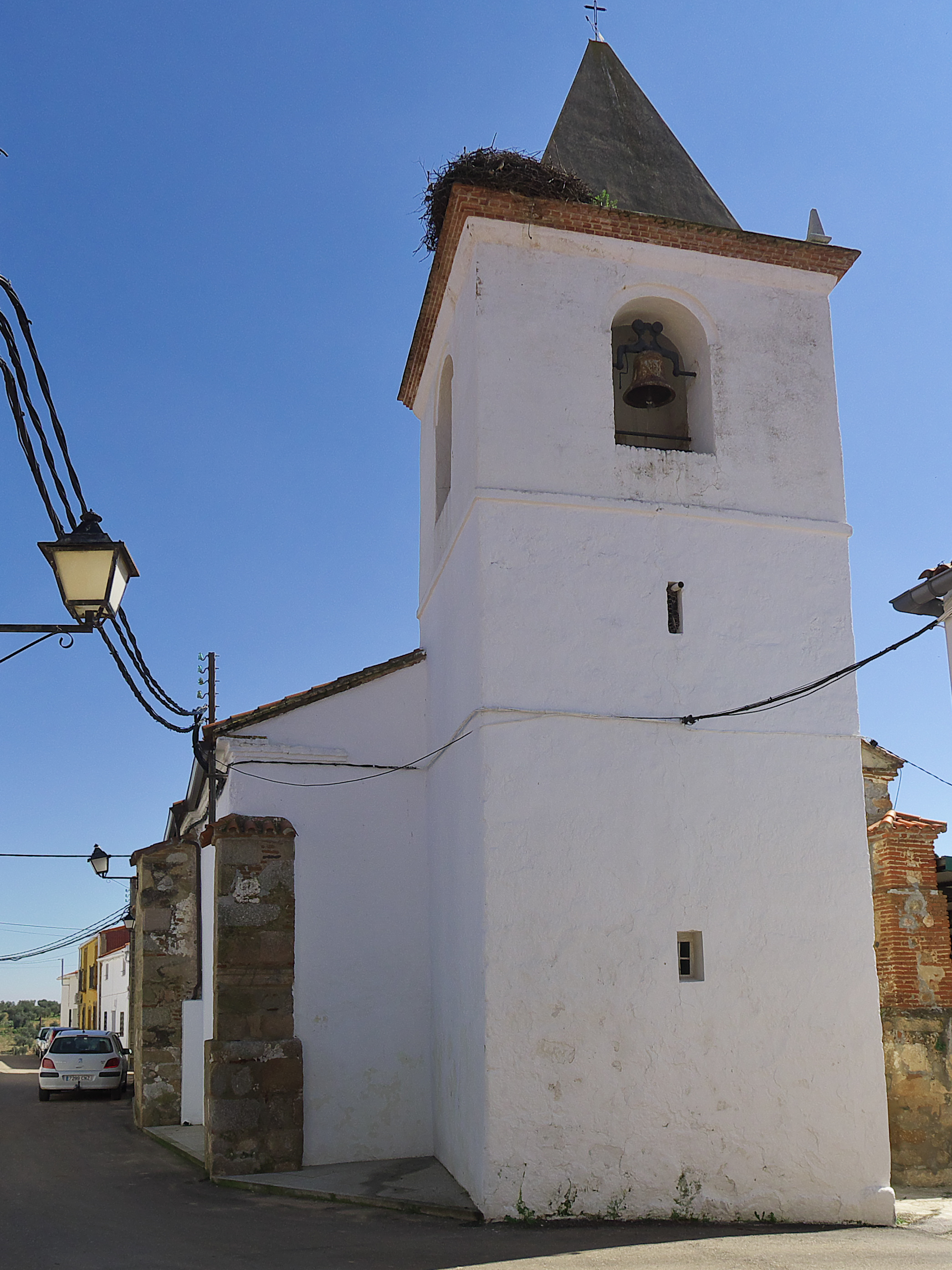 Campanario de la iglesia parroquial